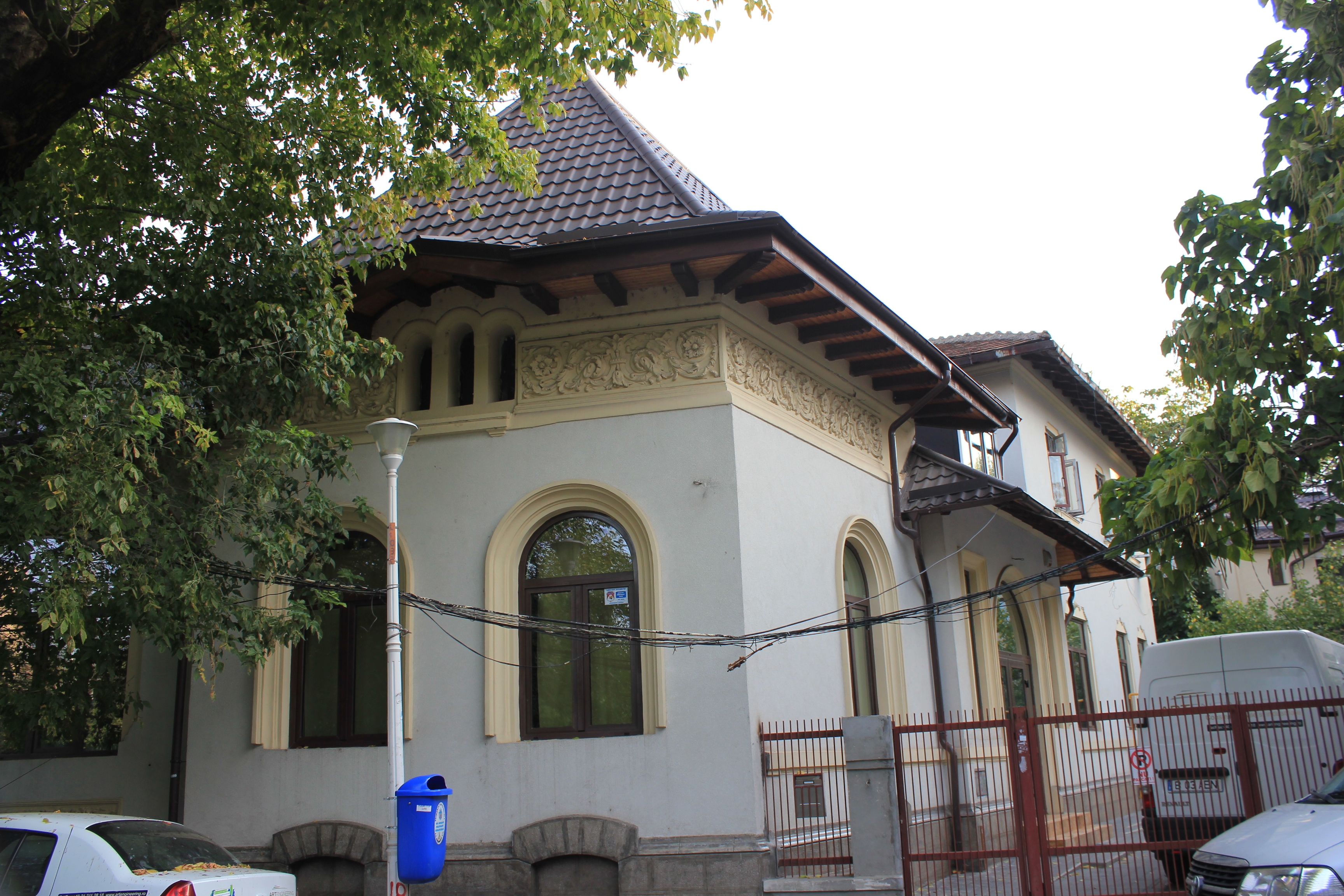 Casă Popa Soare 56